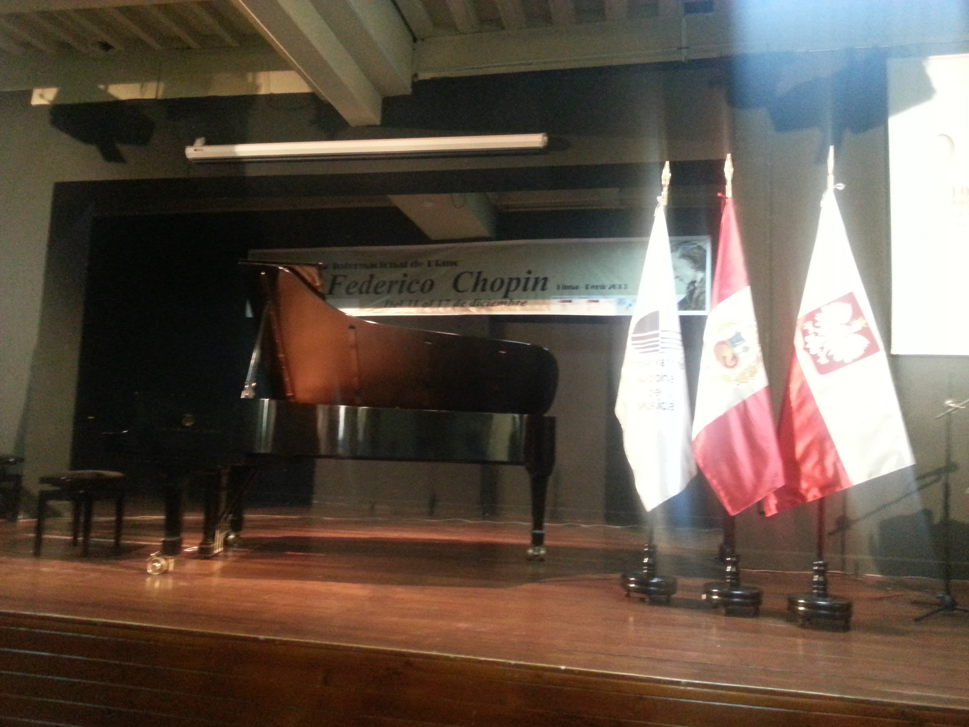 Sala de Audiciones de la Sede Histórica del Conservatorio Nacional de Música